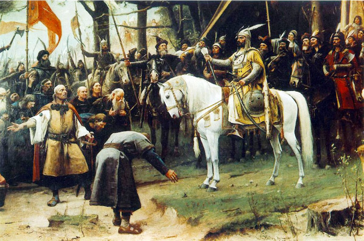 Munkácsy Mihály: Honfoglalás (1893)